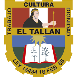 Escudo El Tallán